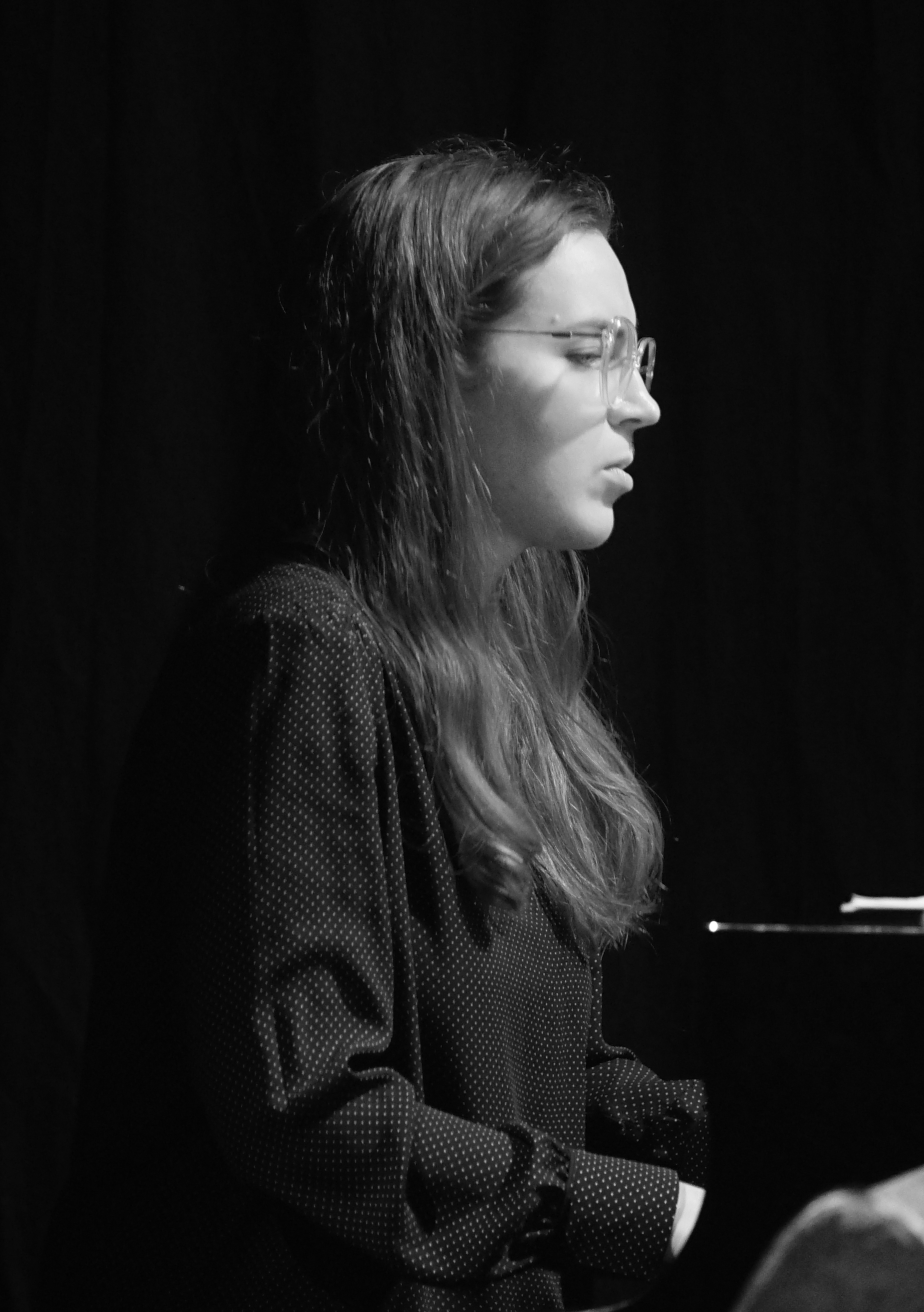 en concert à la Cartonnerie de Reims.